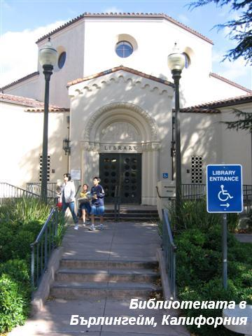 Библиотеката в Бърлингейм (авторска снимка)